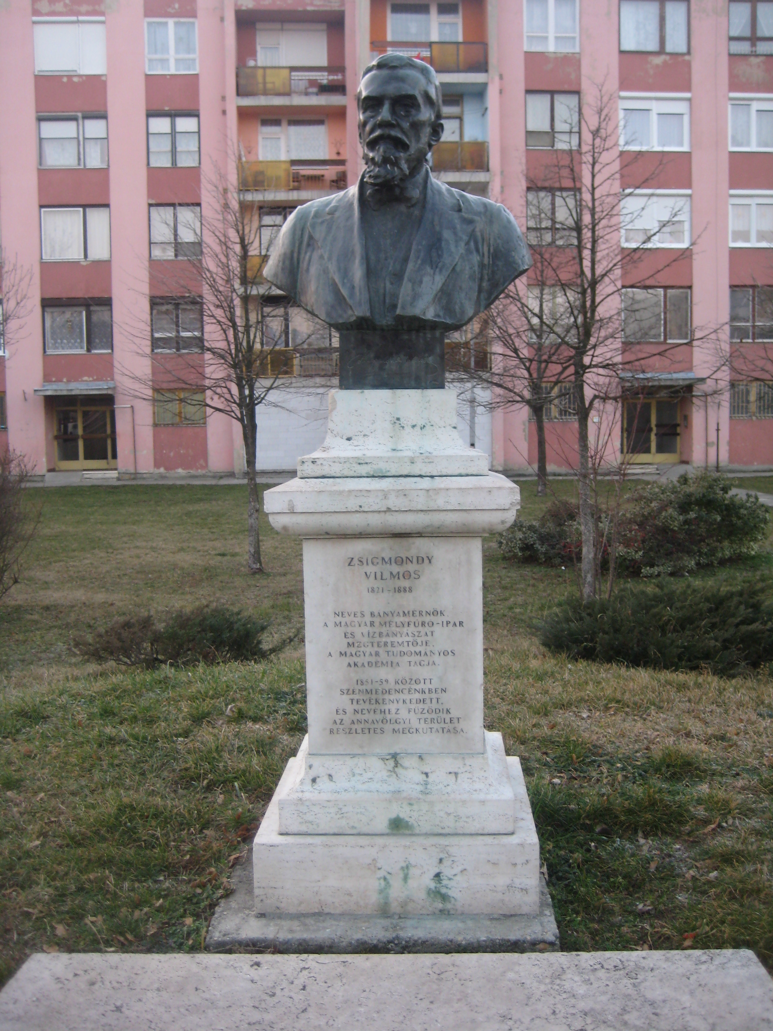 Zsigmondy Vilmos emlékszobor Dorogon, háttérben a Zsigmondy Vilmos lakóteleppel. Markup Béla alkotása